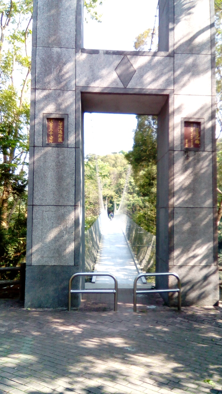 位於龍崎市區 182市道旁